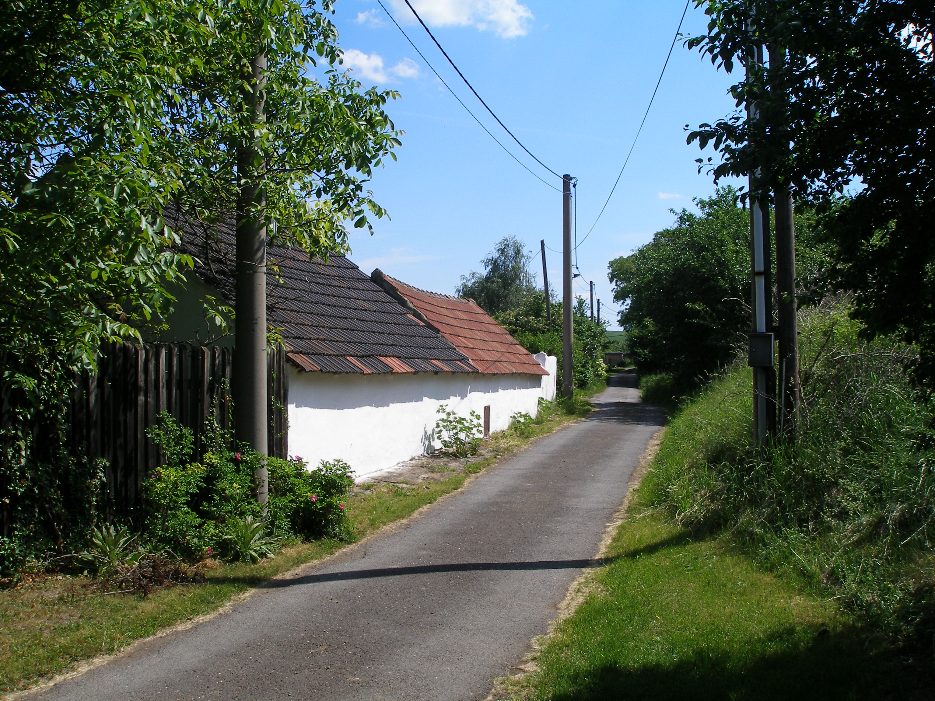 Zástavba v Malé Bučině.